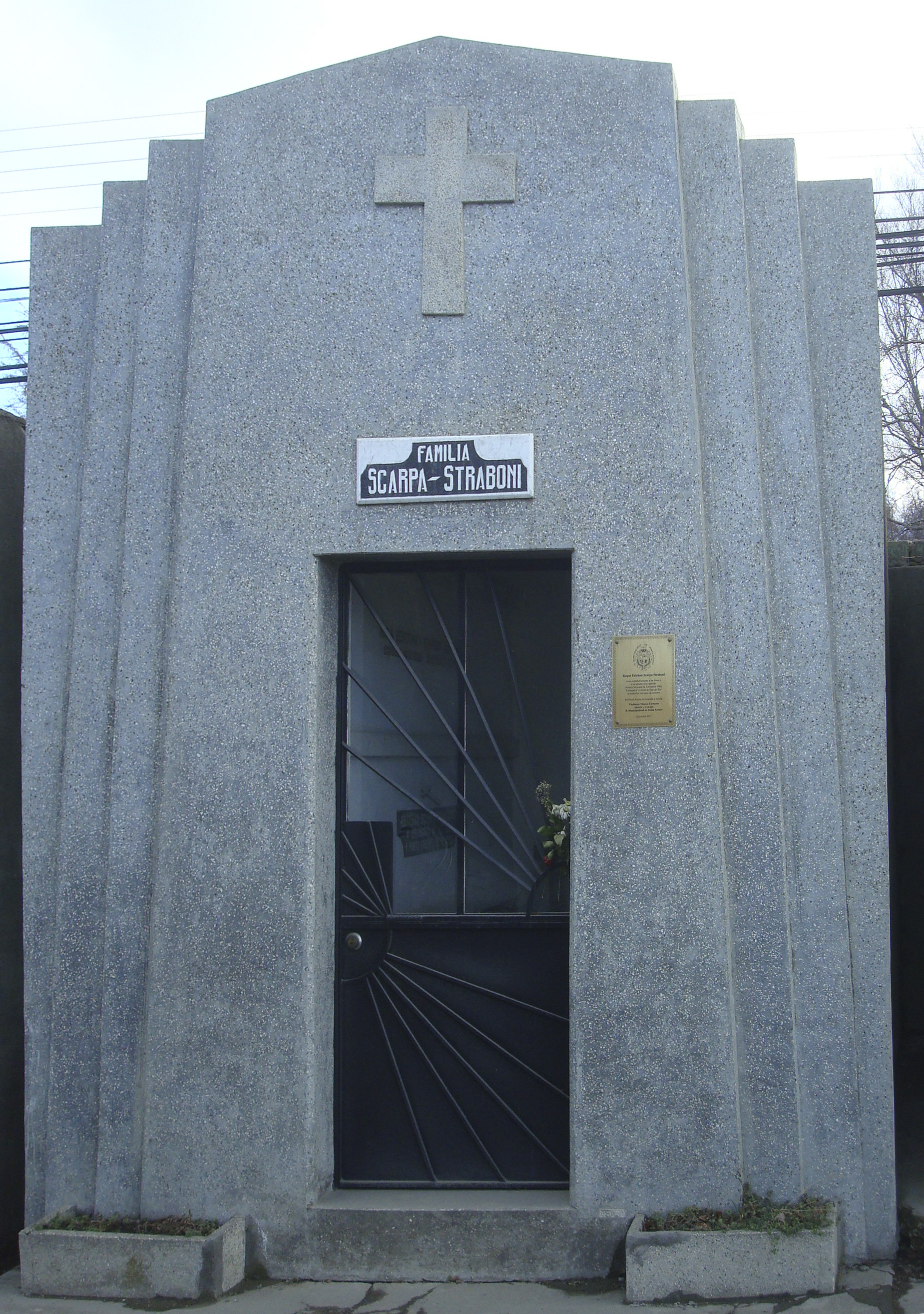 Mausoleo de la familia Scarpa Straboni, donde está la tumba de Roque Esteban Scarpa Straboni, Premio Nacional de Literatura de Chile de 1980. Cementerio Municipal de Punta Arenas Punta Arenas, Chile Agosto de 2012